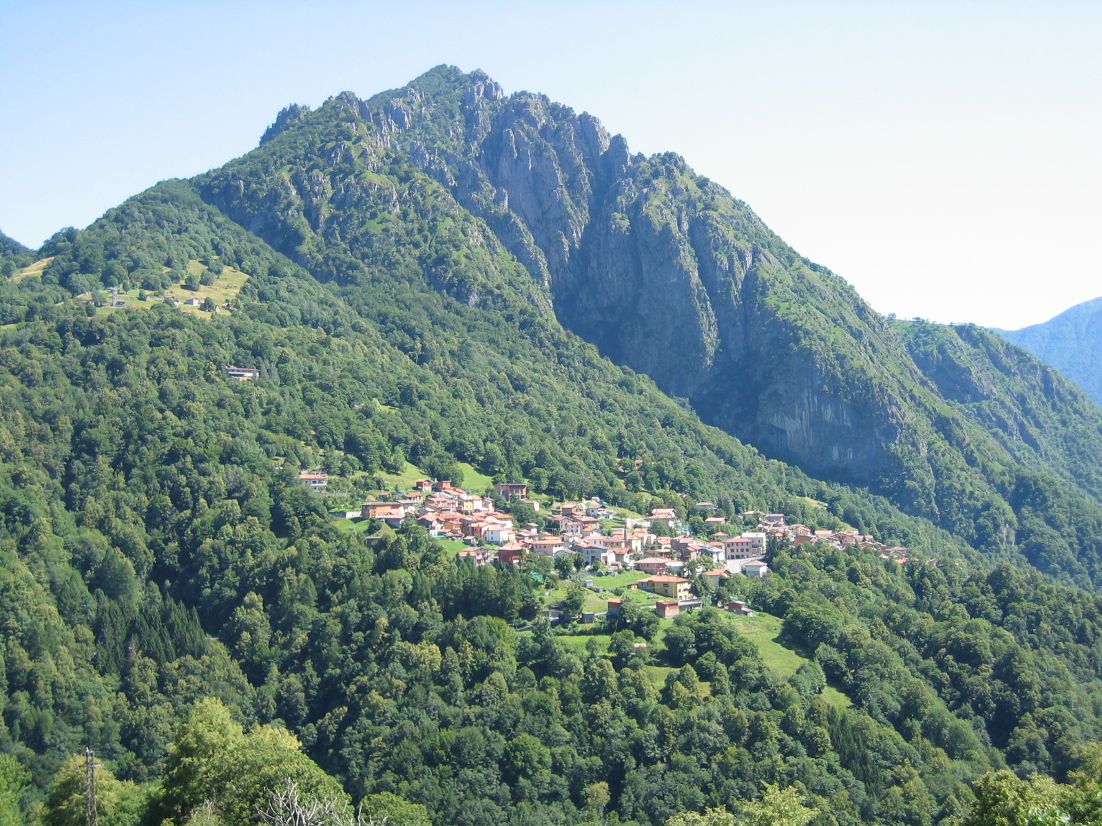 Le village de Cusino, en Italie